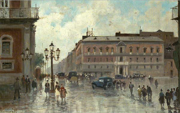 Italienischer Platz.(laut Auktionshaus "Teilansicht von Neapel mit dem Palazzo Reale").